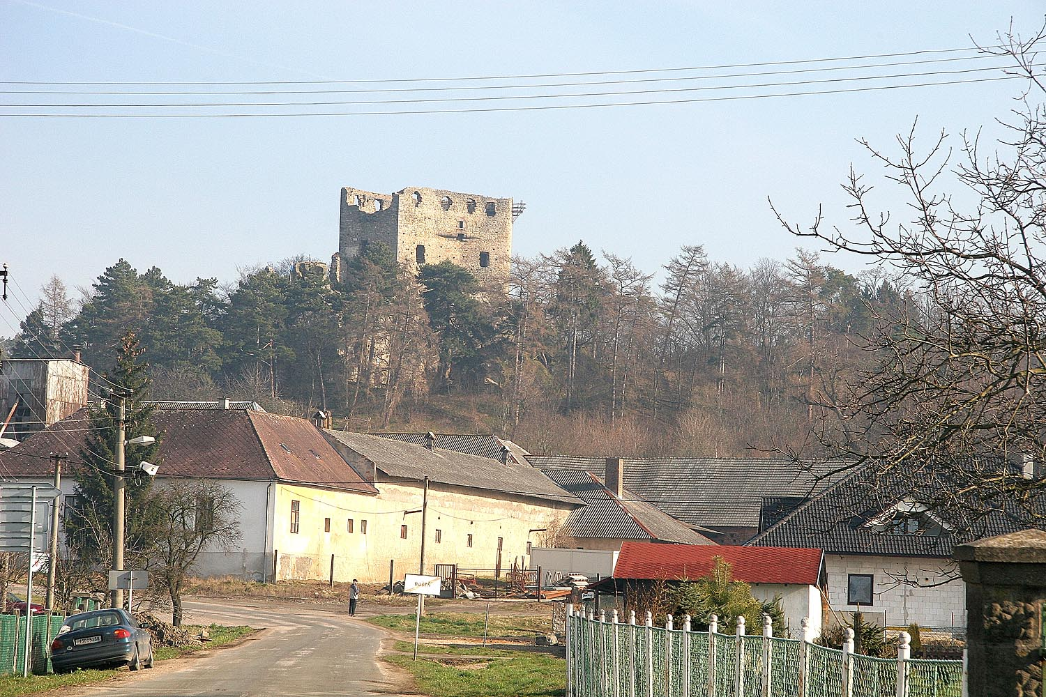 Hrad Valečov - pohled od obce Boseň, district Mladá Boleslav, Czech Republic autor:Prazak date: 11. 3. 2007